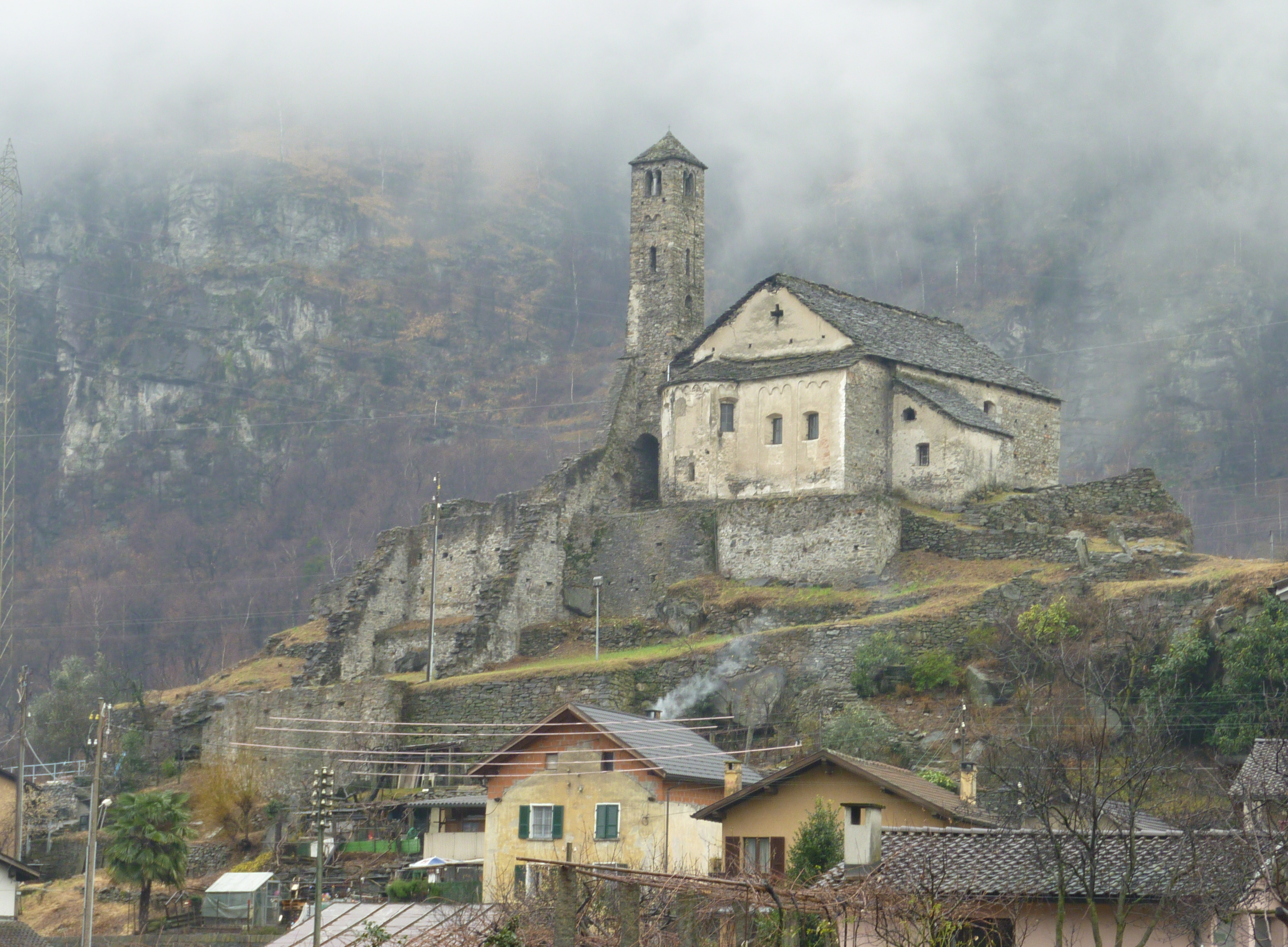 Kirche Santa Maria del Castello Santa Maria del Castello